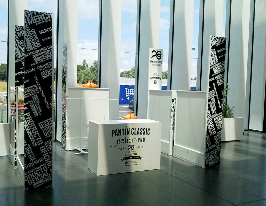 Merchandise Pantin Classic Pro, Parque O Boial Ferrol